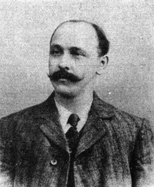 Österreichischer Politiker, Reichsratswahl 1907, Name siehe Dateiname